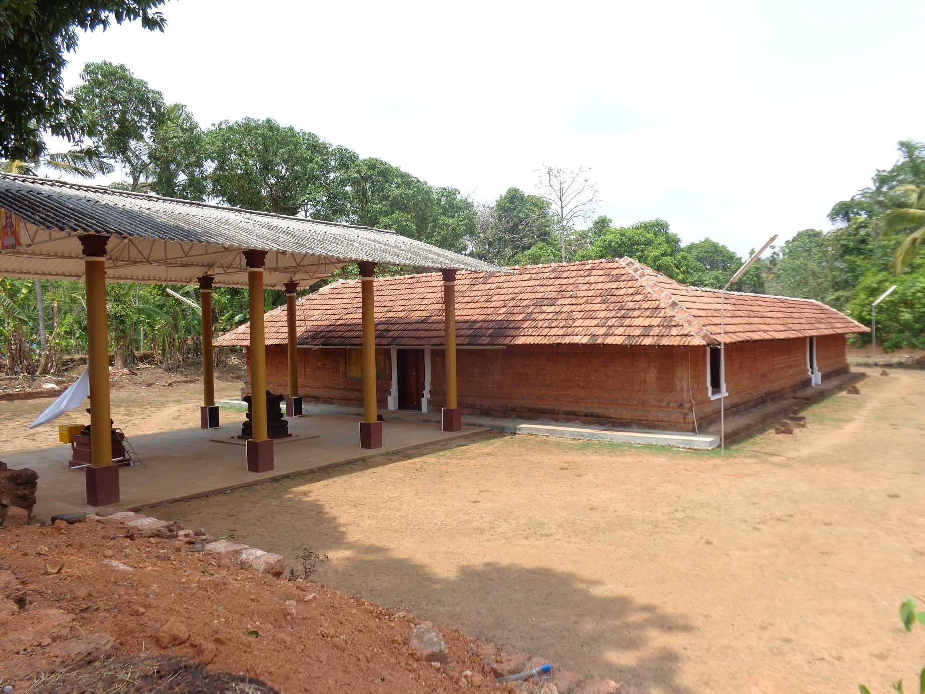 നീർവേലി ശ്രീരാമസ്വാമിക്ഷേത്രം , നീർവേലിം കൂത്തുപറമ്പ്, കണ്ണൂർ ജില്ല